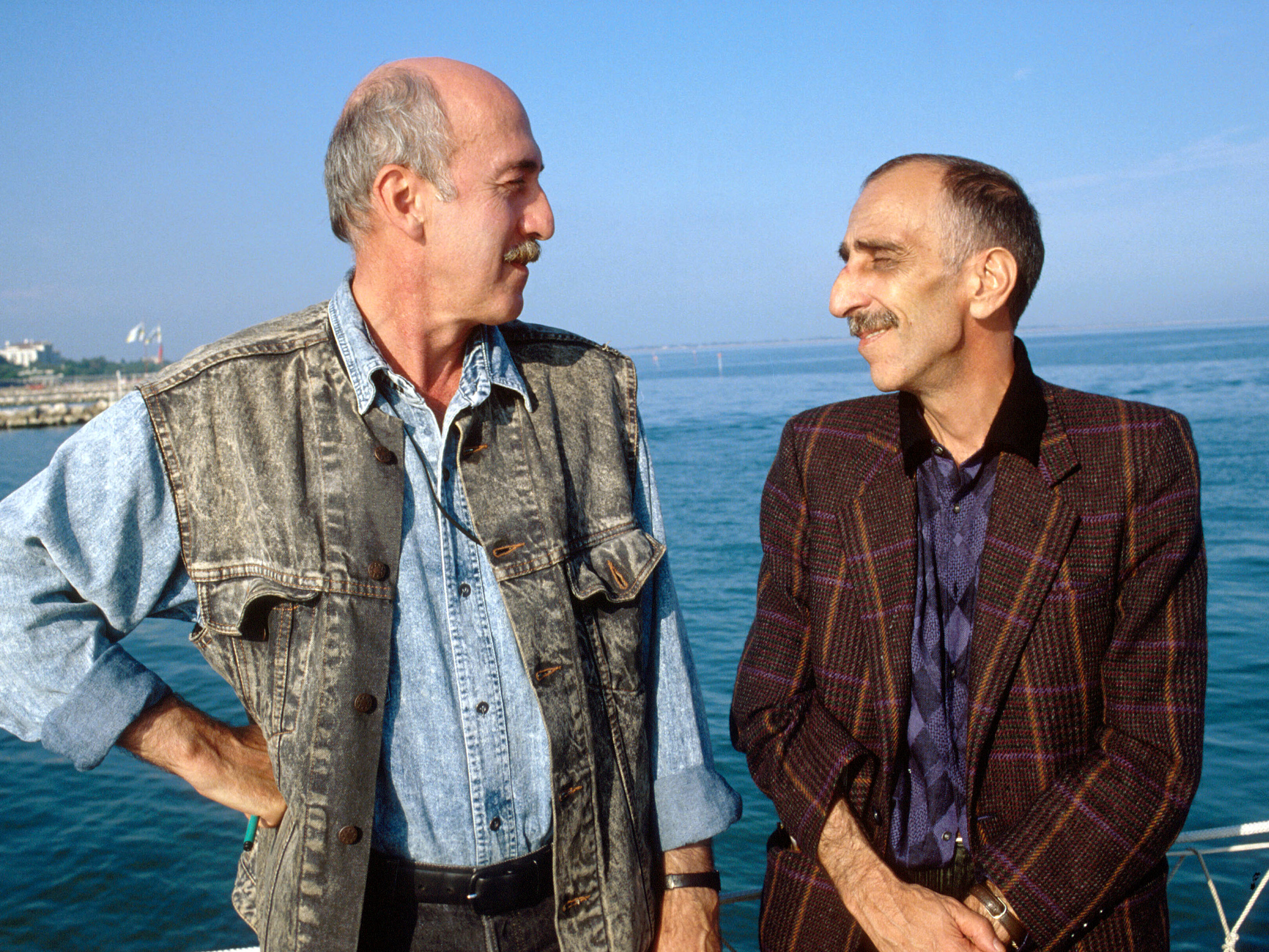 Il regista georgiano Otar Ioseliani con Joao Cesar Monteiro alla Mostra del Cinema di Venezia del 1989